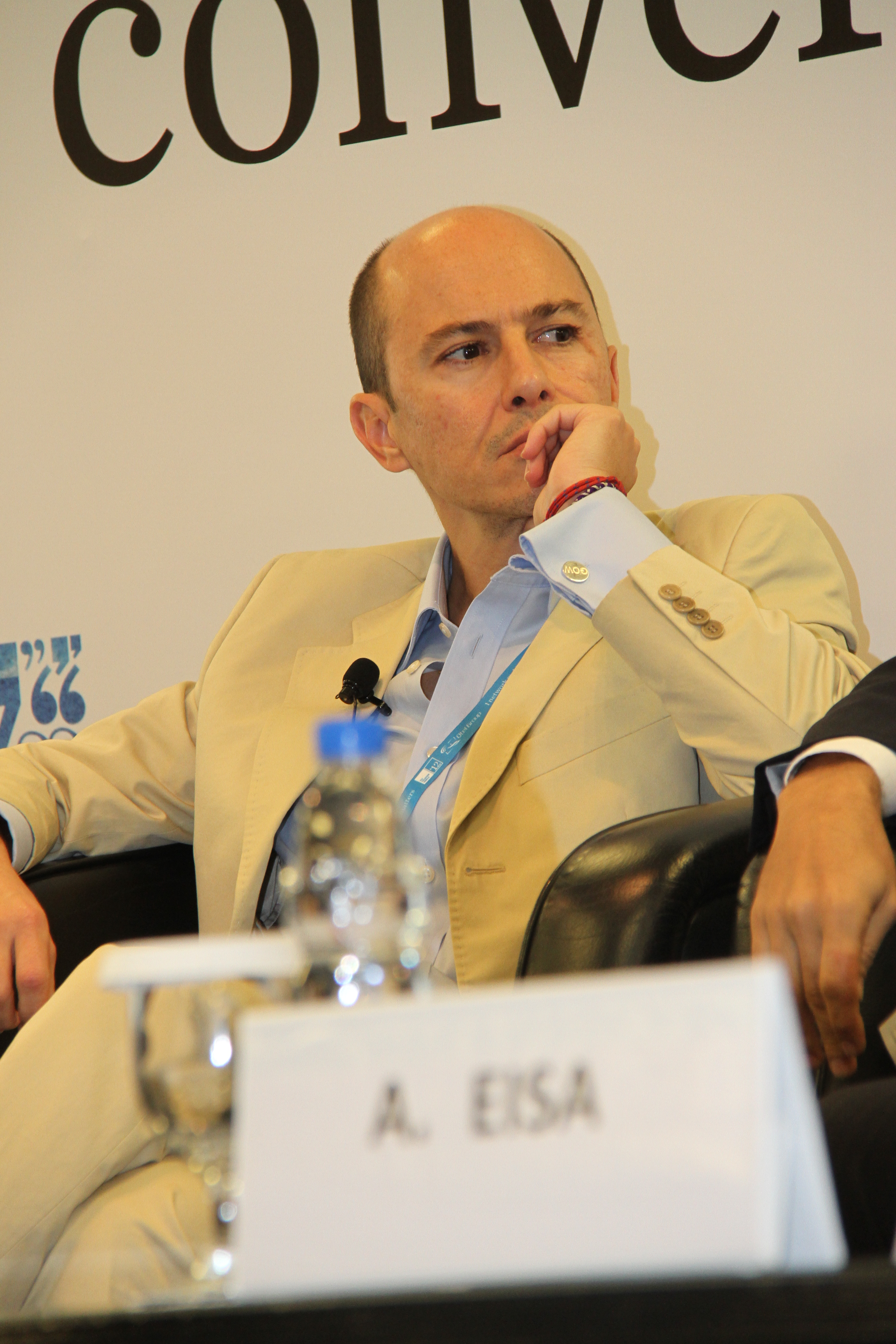 Jenaro García, CEO de Gowex, en una sesión del ITU Telecom World 2012 celebrado en Dubai